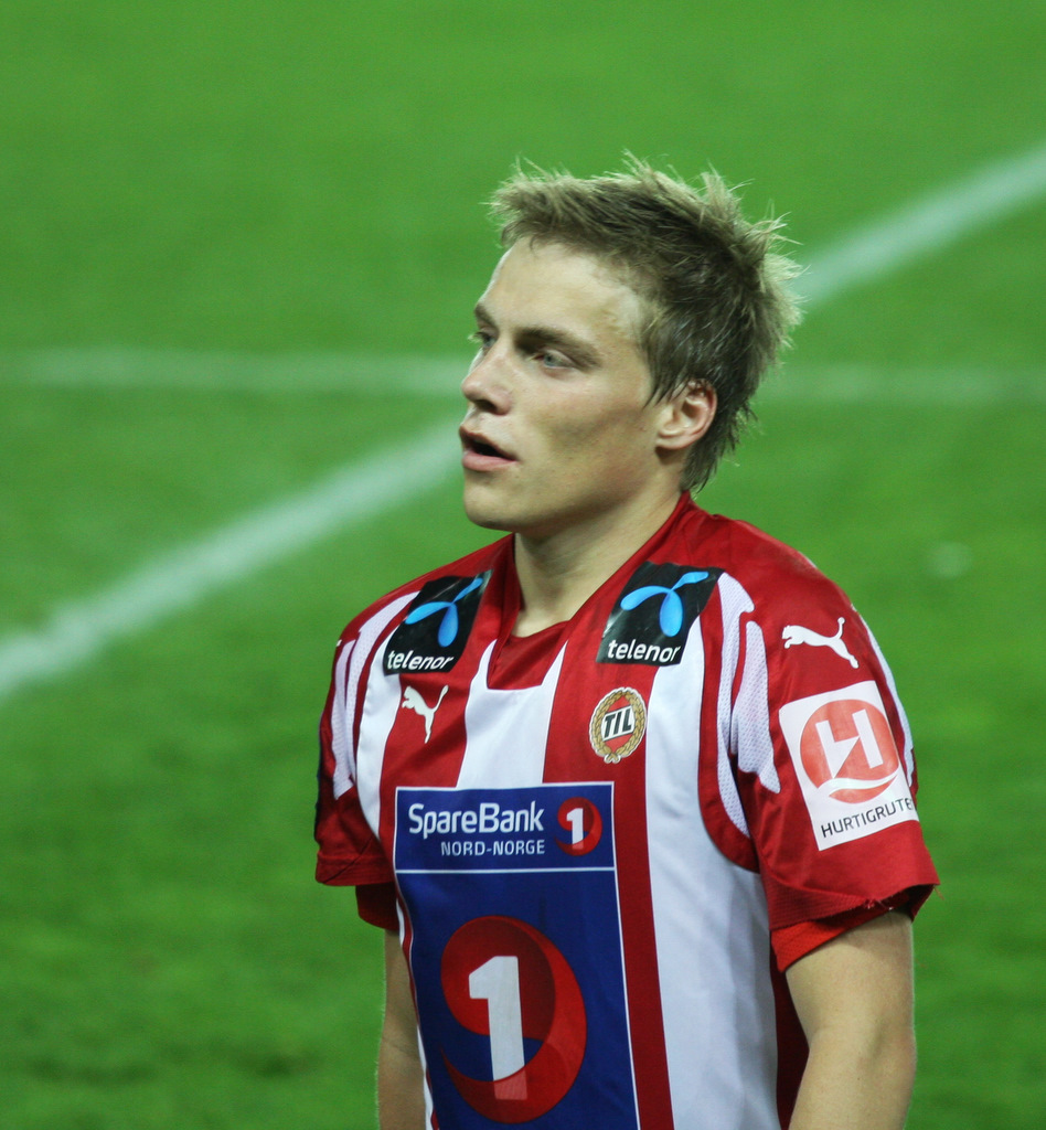 Ruben Yttergård Jensen